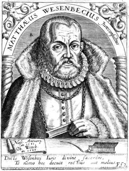 Matthaeus Wesenbeck (1531-1586) war einer der bedeutendsten flämischen Juristen des frühen usus modernus pandectarum.